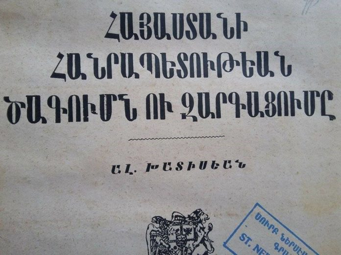 "Возникновение и развитие Республики Армения" Александра Хатисяна